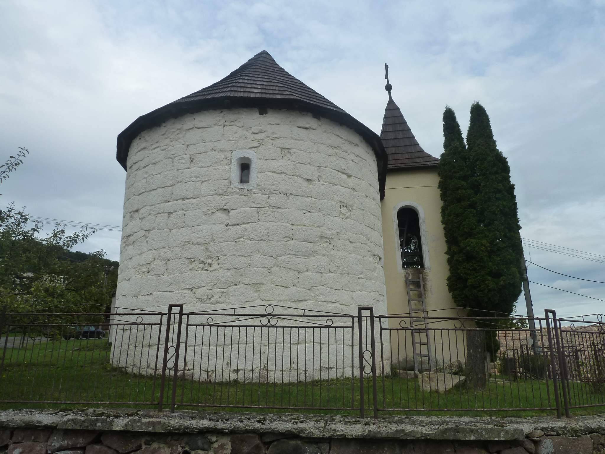 Renesančný kostol v Baďane